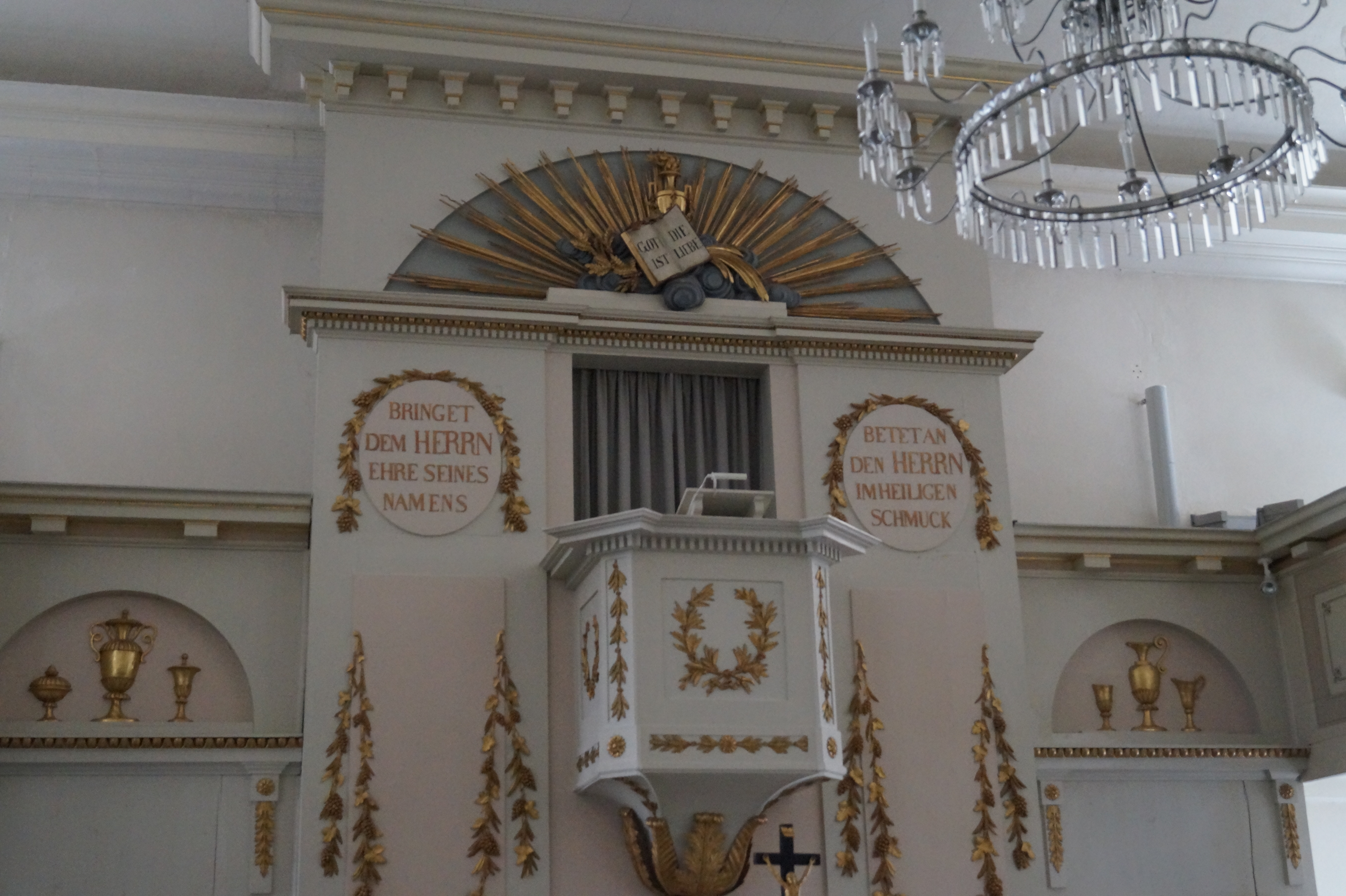 Altar der Kirche vom Eingang an der Nordseite aus gesehen